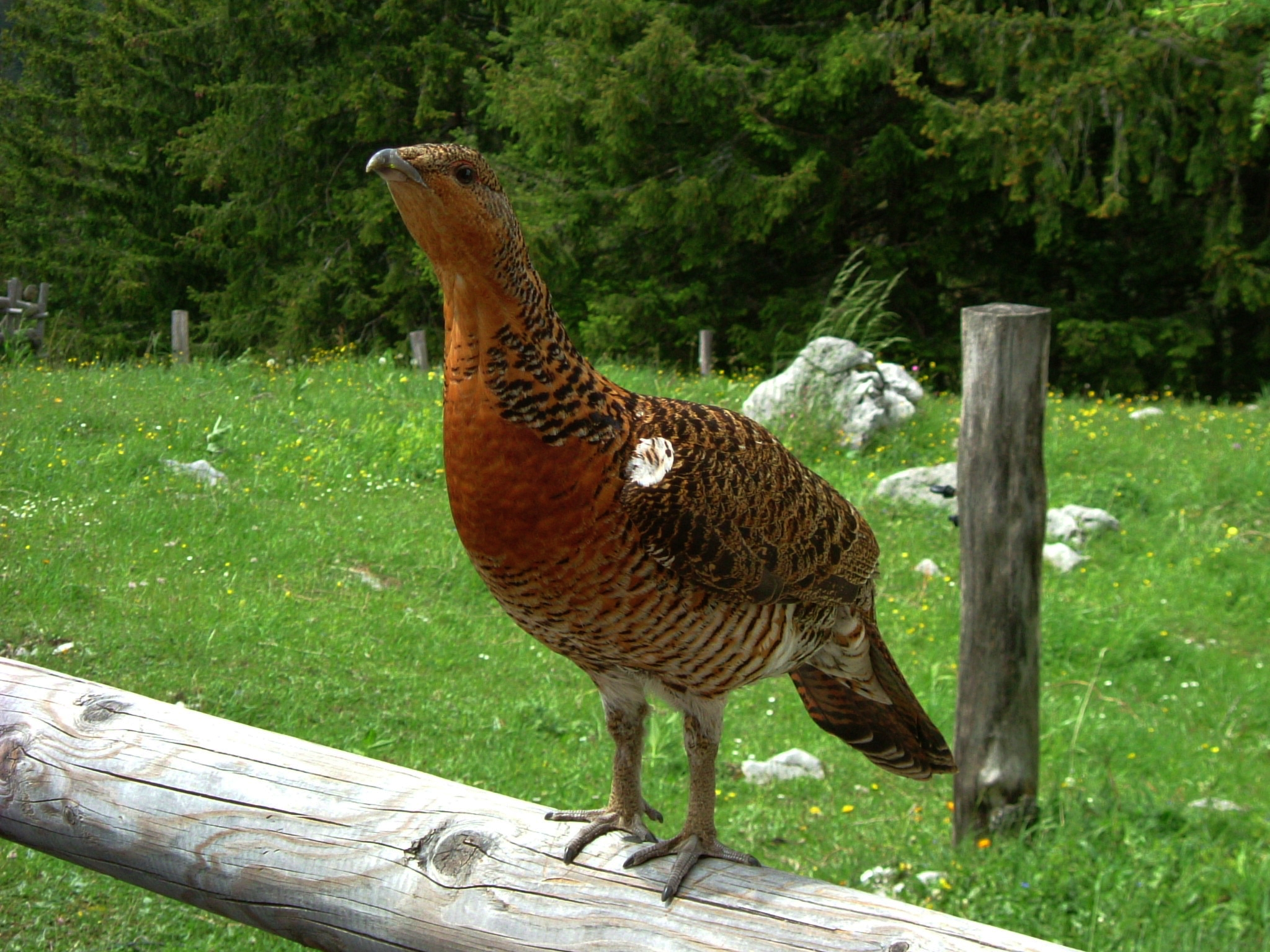 Auerhenne am Kühroint (Berchtesgadener Land)